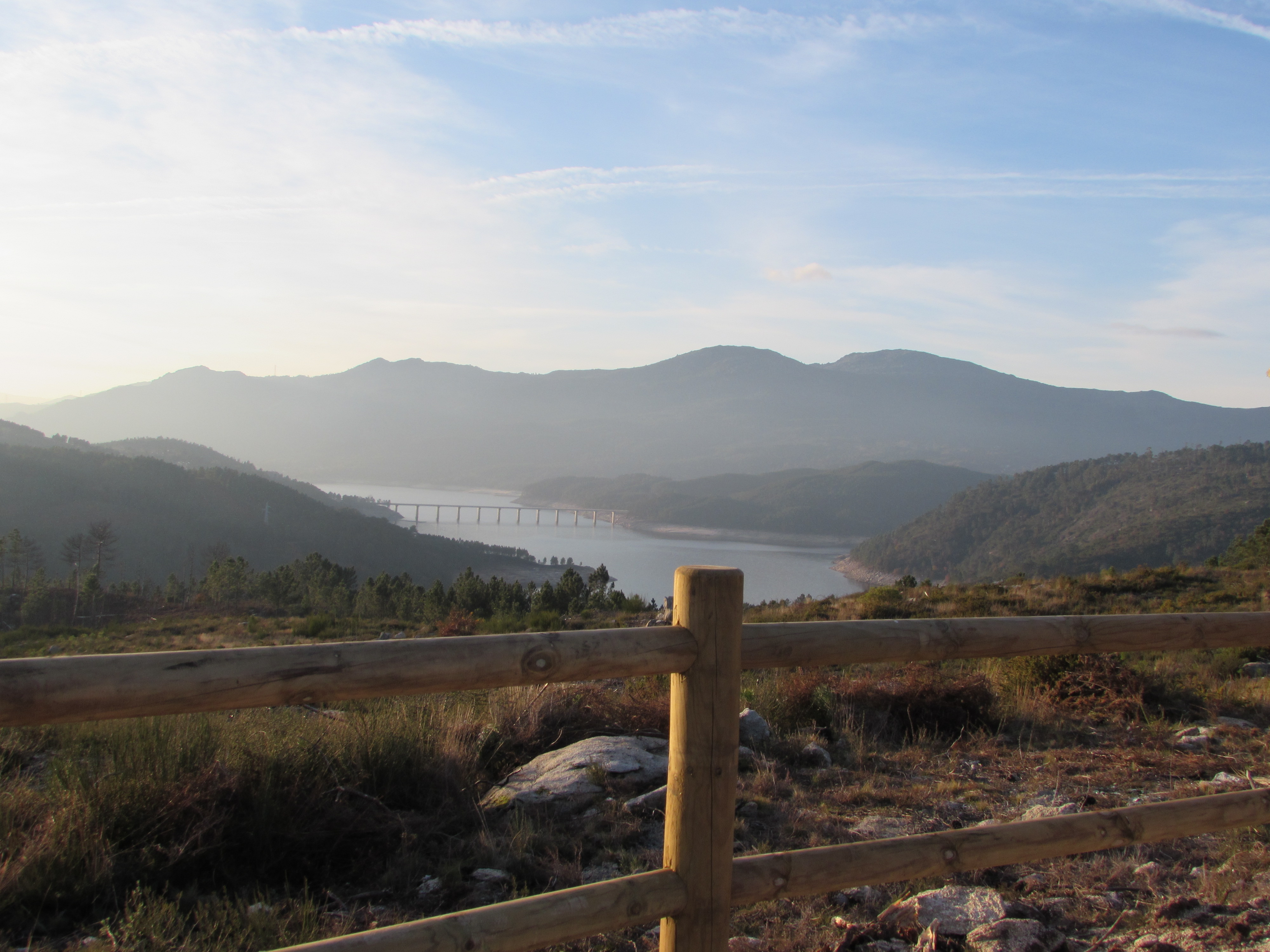 Vista do Enconro de Lindoso dende o Mirador da Piteira.